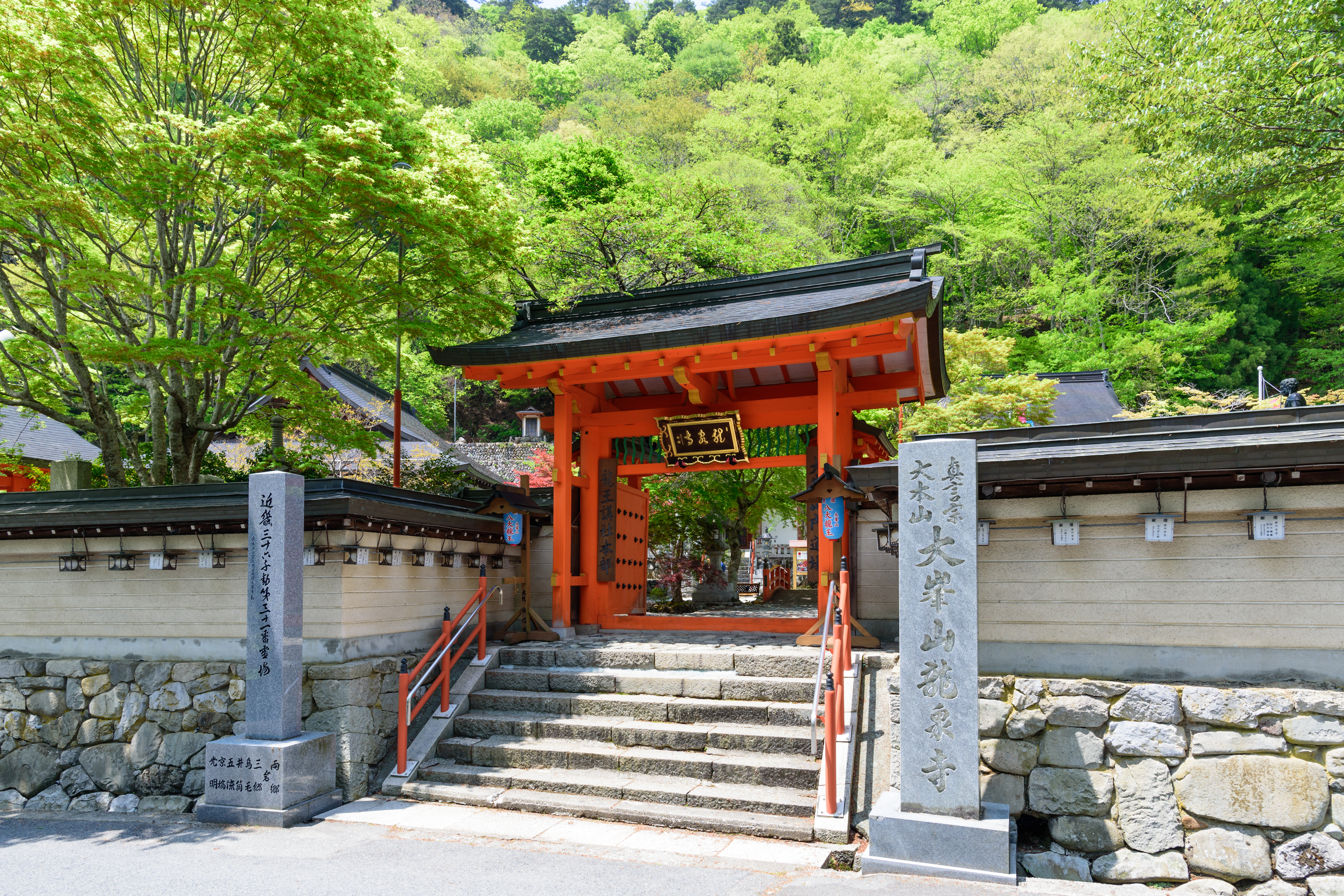 洞川の龍泉寺総門